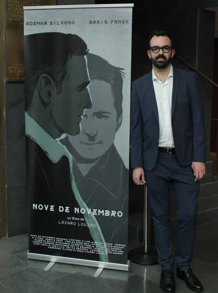 Lázaro Louzao